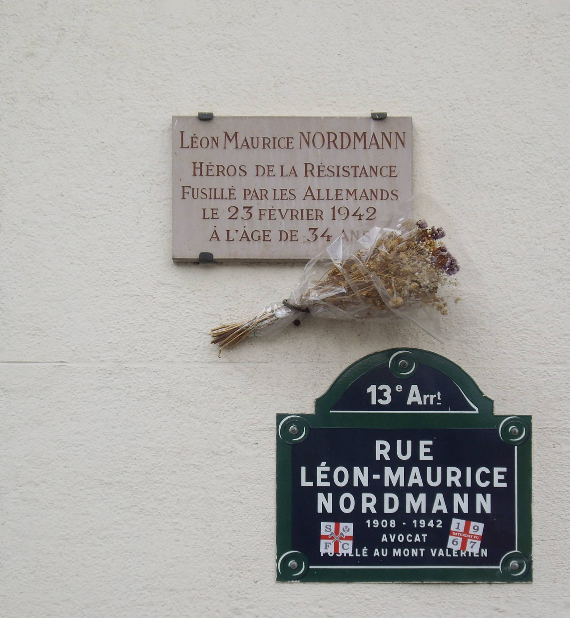 Plaque commémorative, 100 rue Léon-Maurice-Nordmann, Paris 13e. « Léon-Maurice-Nordmann, héros de la Résistance, fusillé par les Allemands le 23 février 1942 à l'âge de 34 ans. »